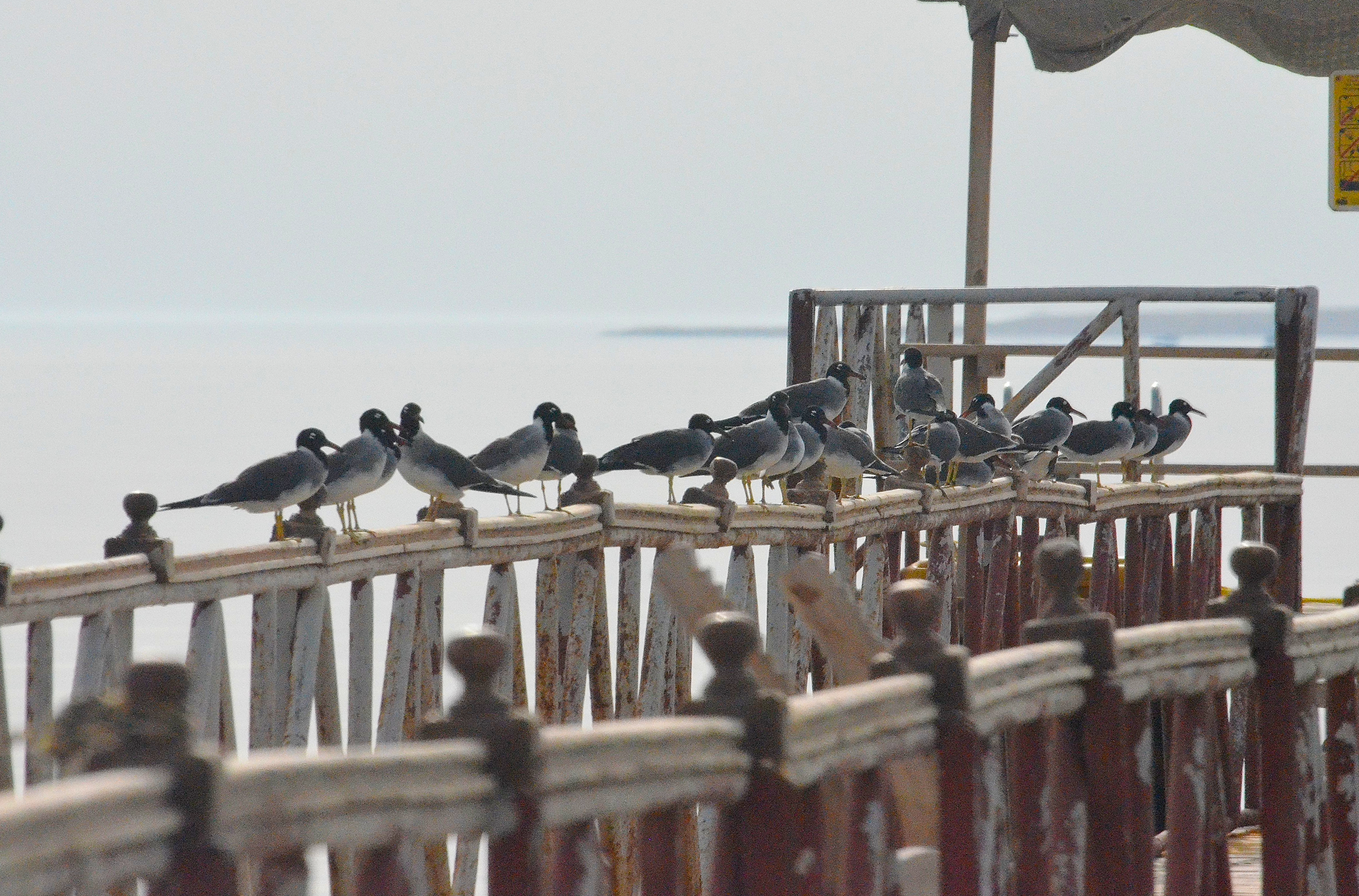 نورس أبيض العين قرب محمية نبق